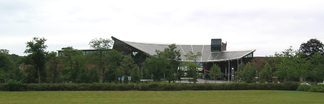 Statoil Research Center, Rotvoll, Trondheim. Built 1993. Architects: Per Knudsen Arkitektkontor and Voll Arkitekter.